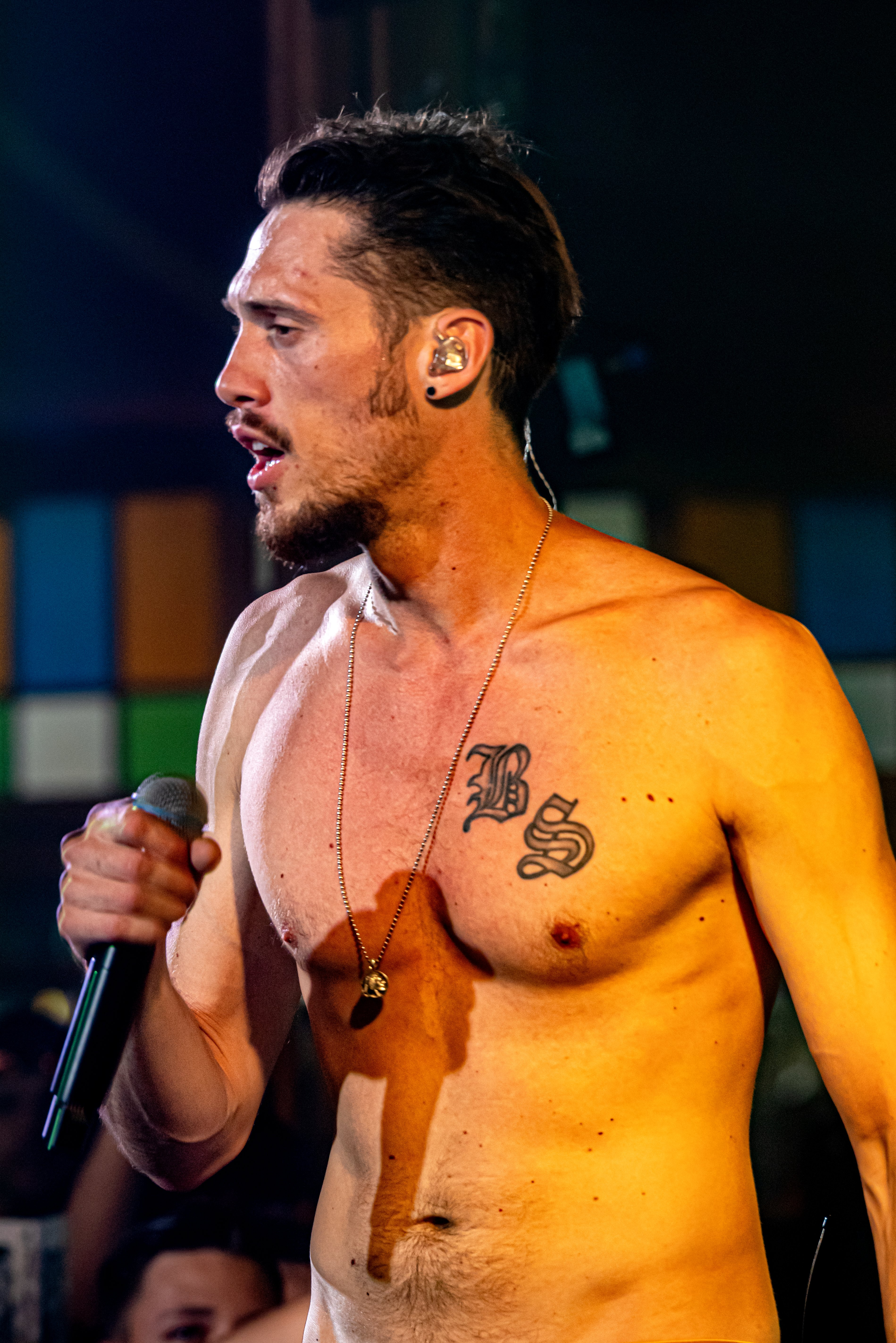 Bilder vom Zelt Musik Festival 2019 in Freiburg im Breisgau